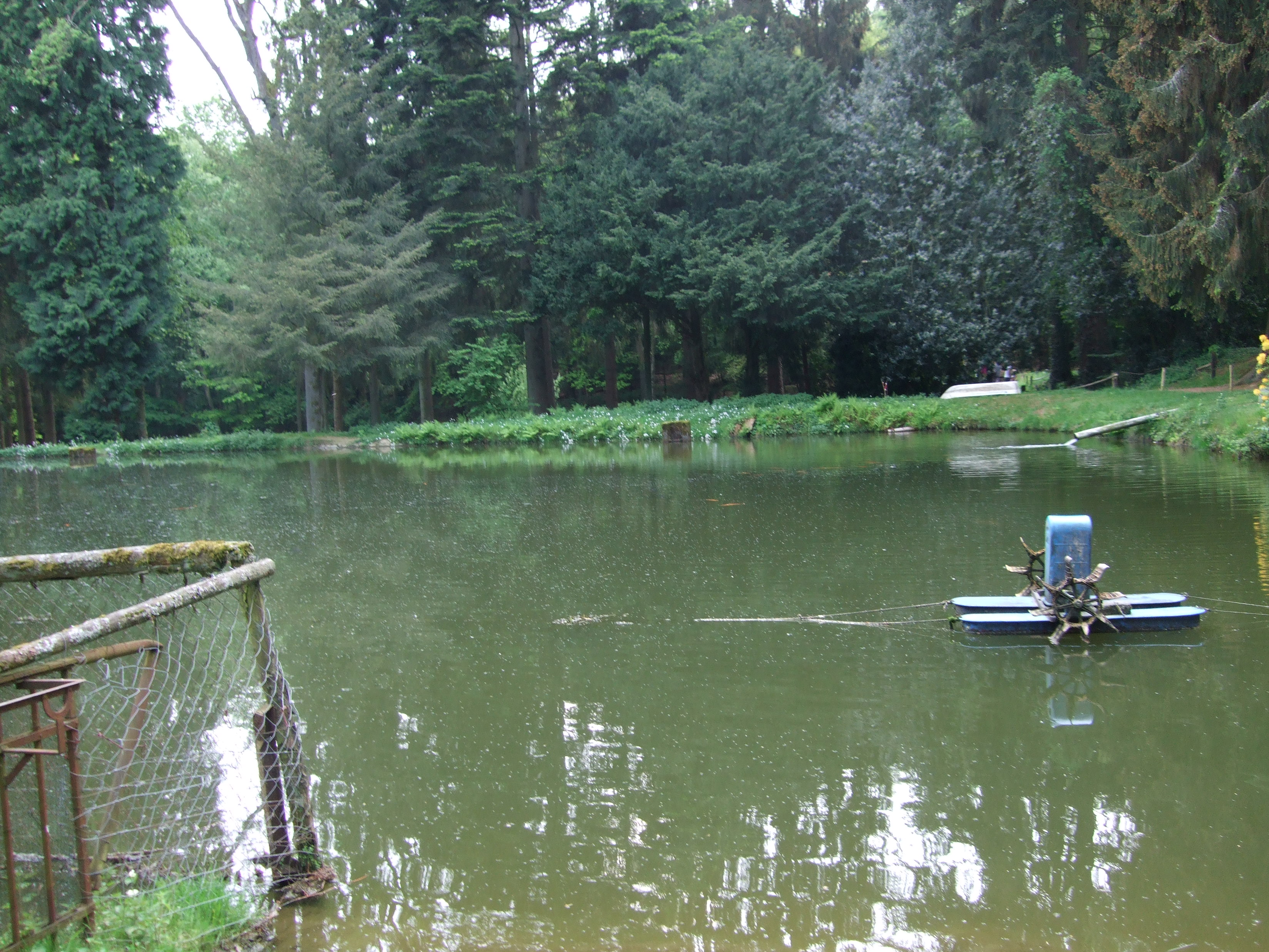 Forellengutweiher am Kalten Wasser